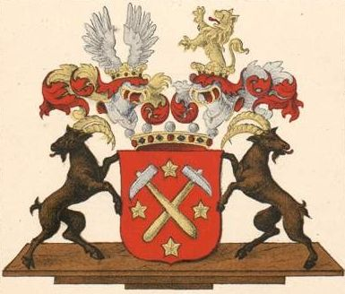 Steinheili suguvõsa vabahärravapp